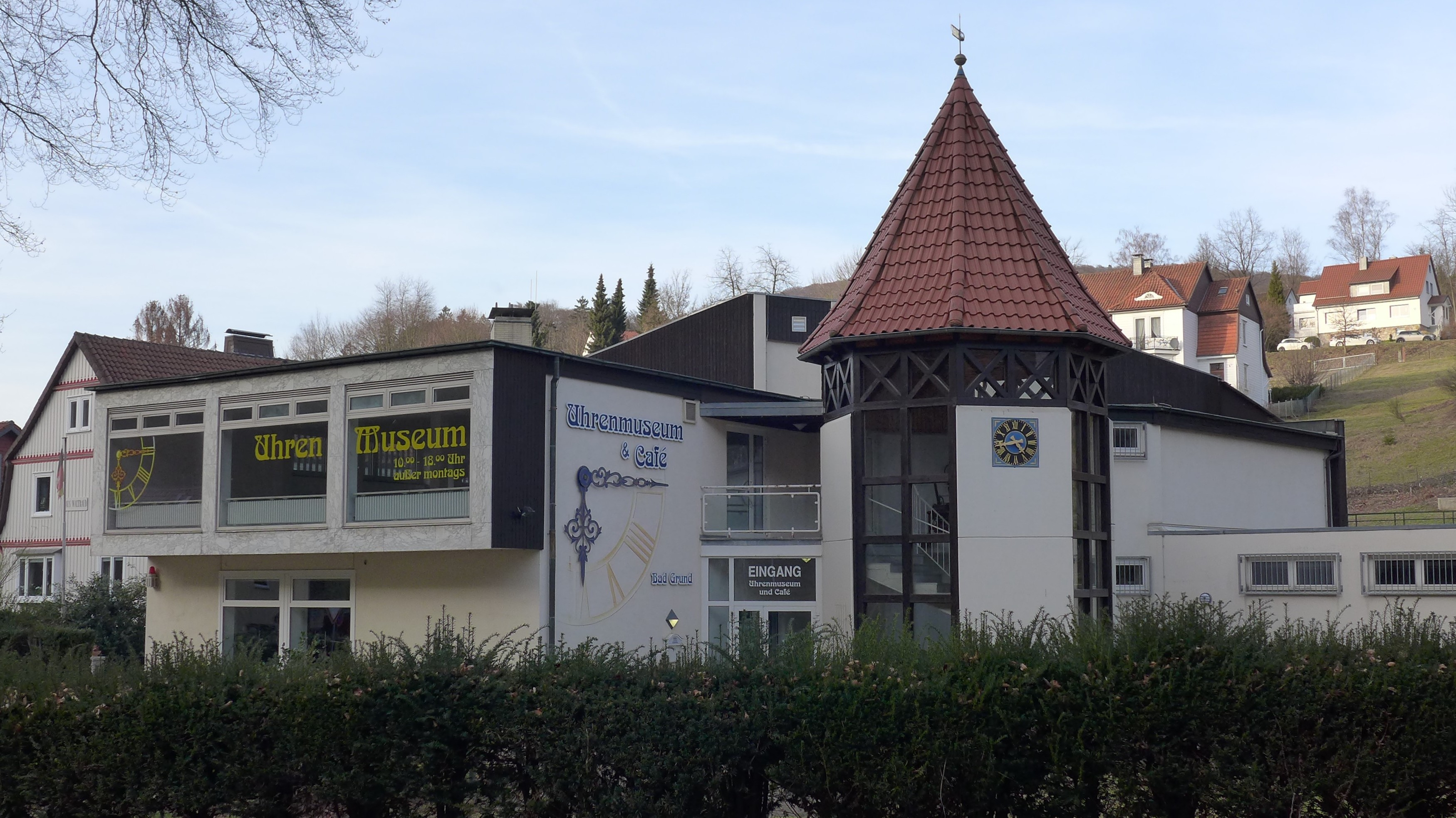 Gebäude